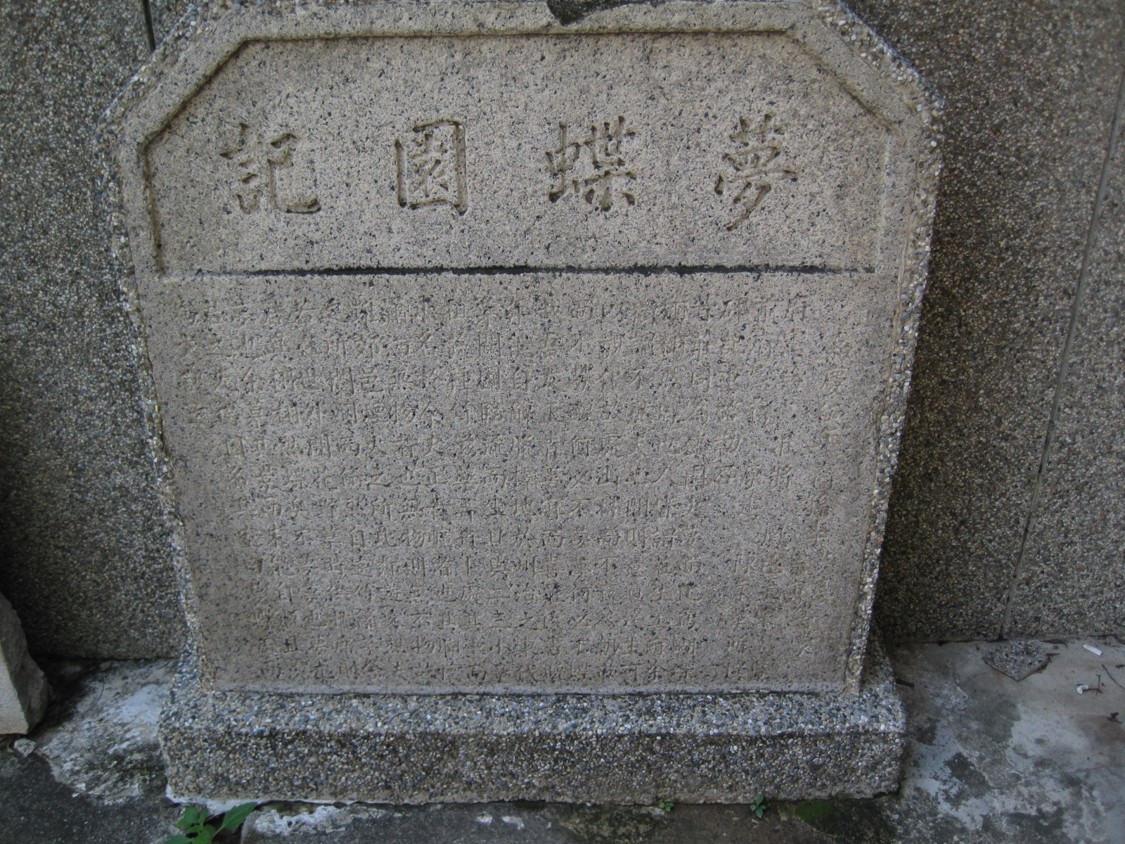 中文（台灣）: 臺南法華寺夢蝶園記碑。